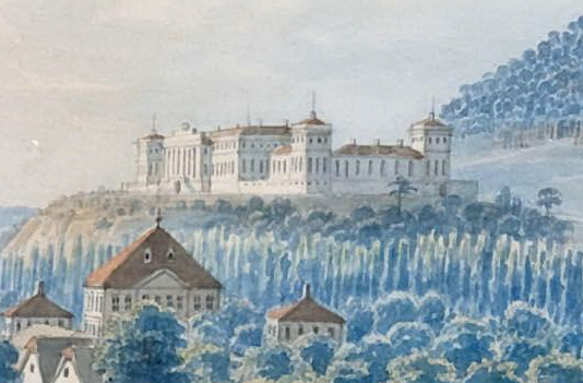 Schloss Weilburg, Detail